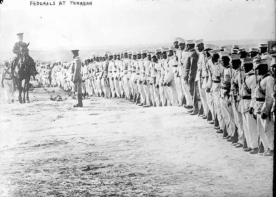 Tropas Federales en Torreón